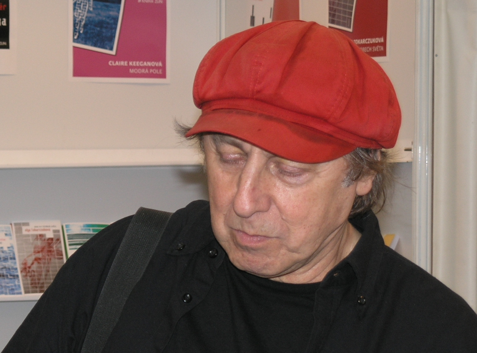 Praha, Svět knihy 2009 - Boris Hybner